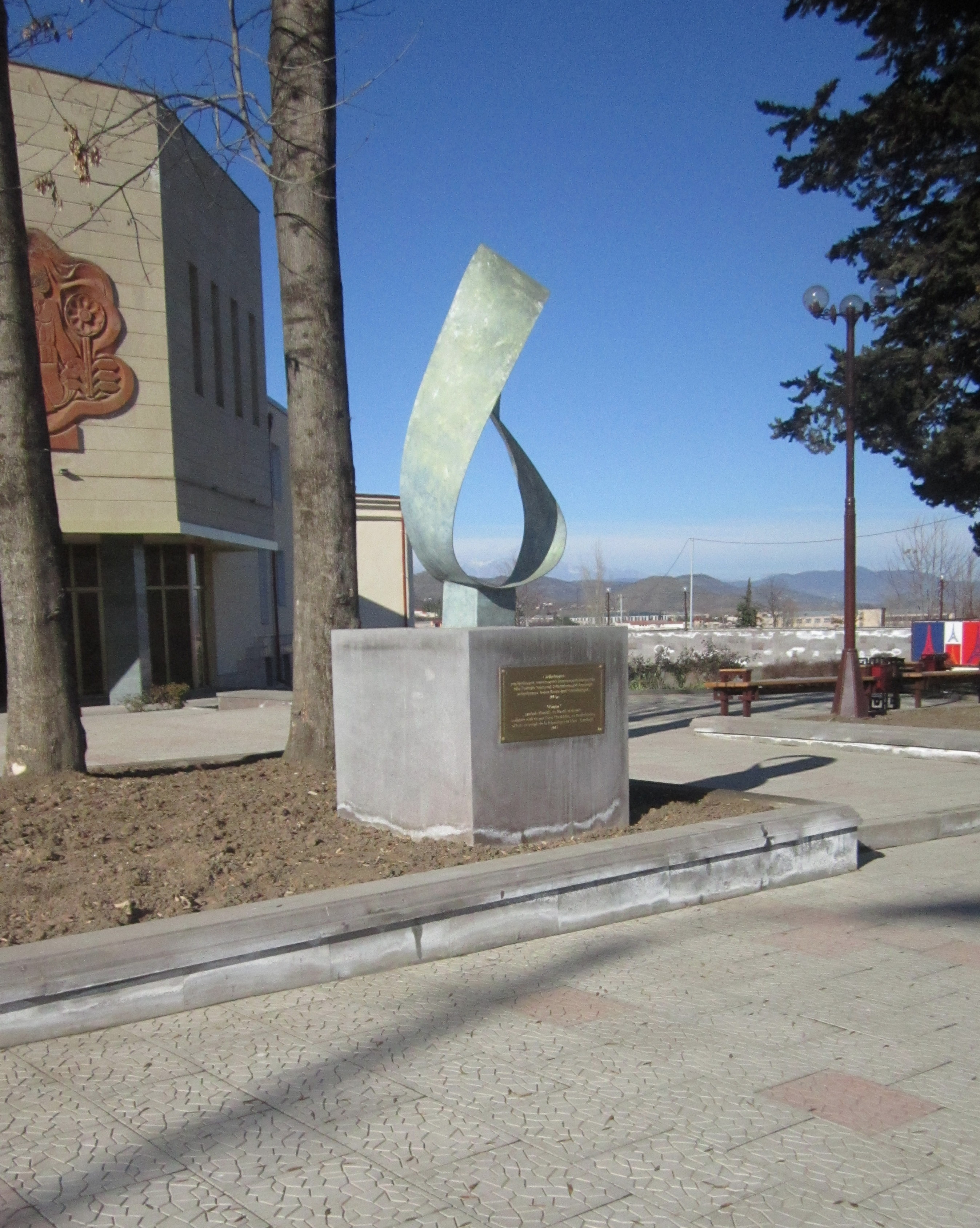 Հայ-ֆրանսիական բարեկամությունը խորհրդանշող «Հավերժություն» քանդակը Թումանյան փողոցում